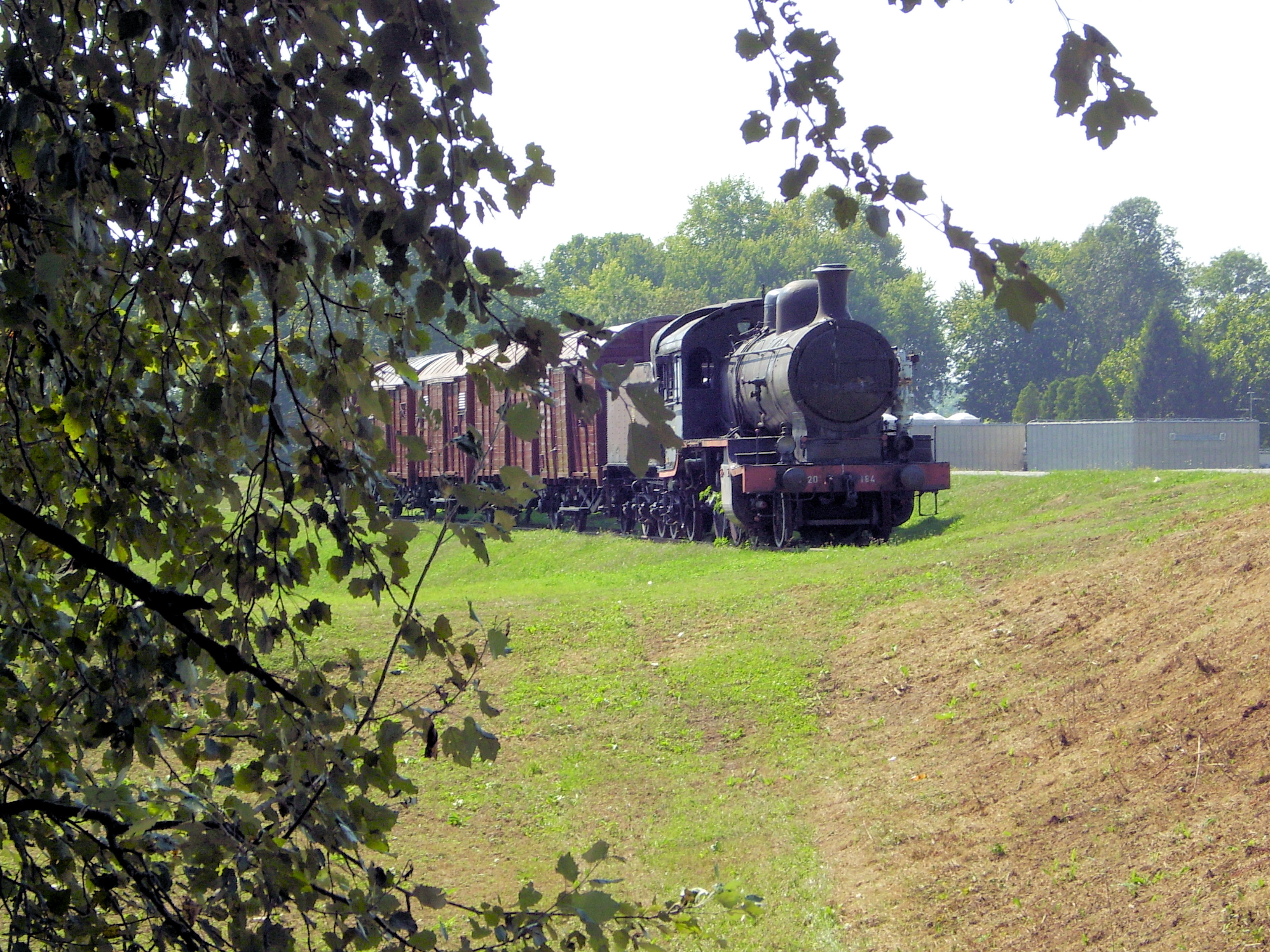 Zug ins Lager, Jasenovac , seine letzte Station